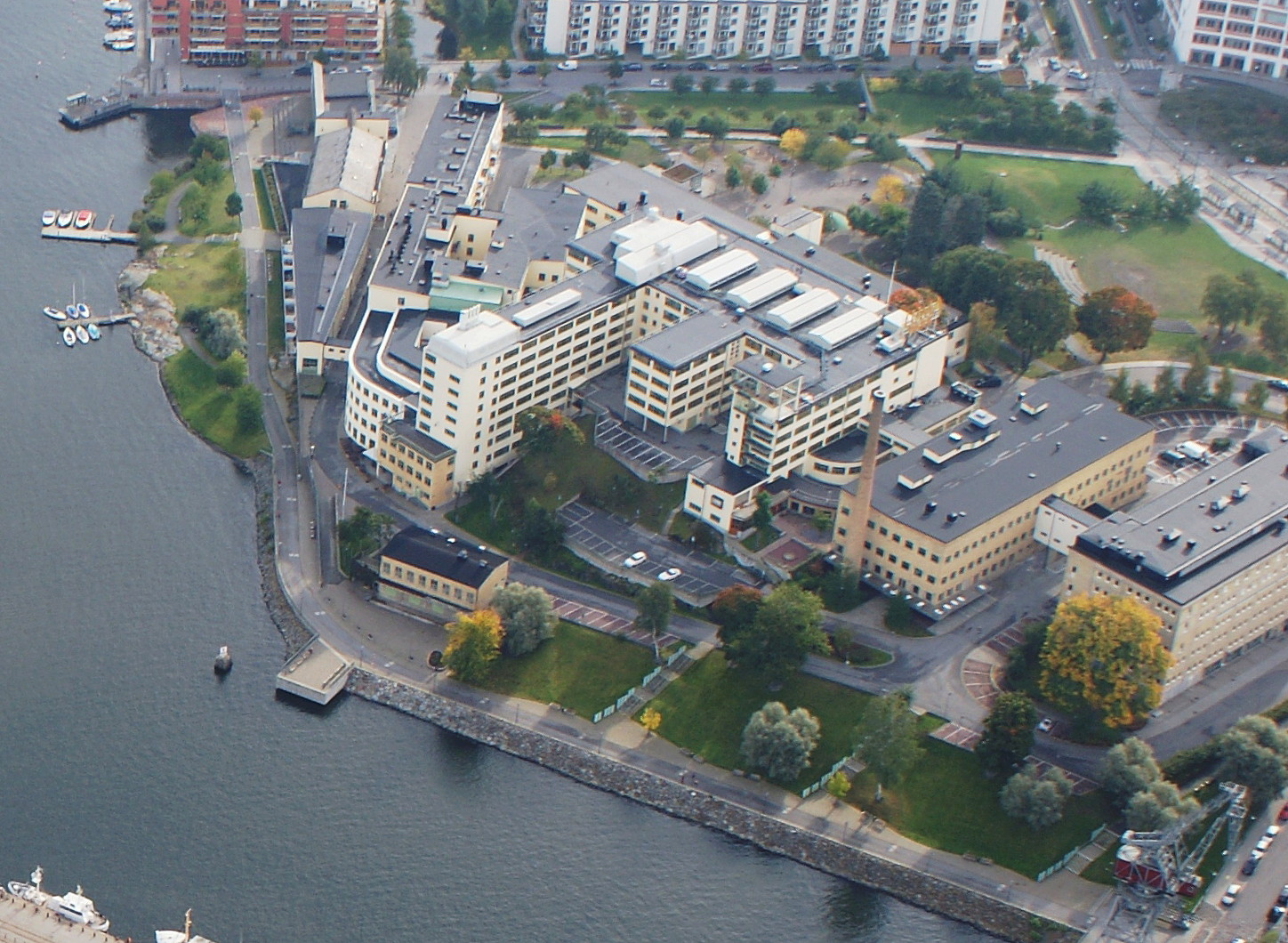 Luma industirområde sett från helikopter.